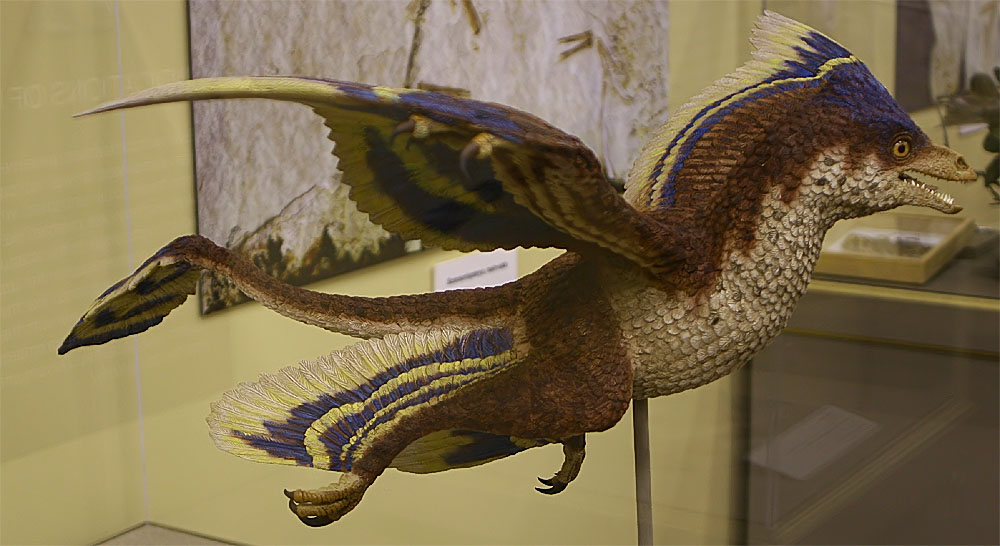 dinosaurio parecido a ave